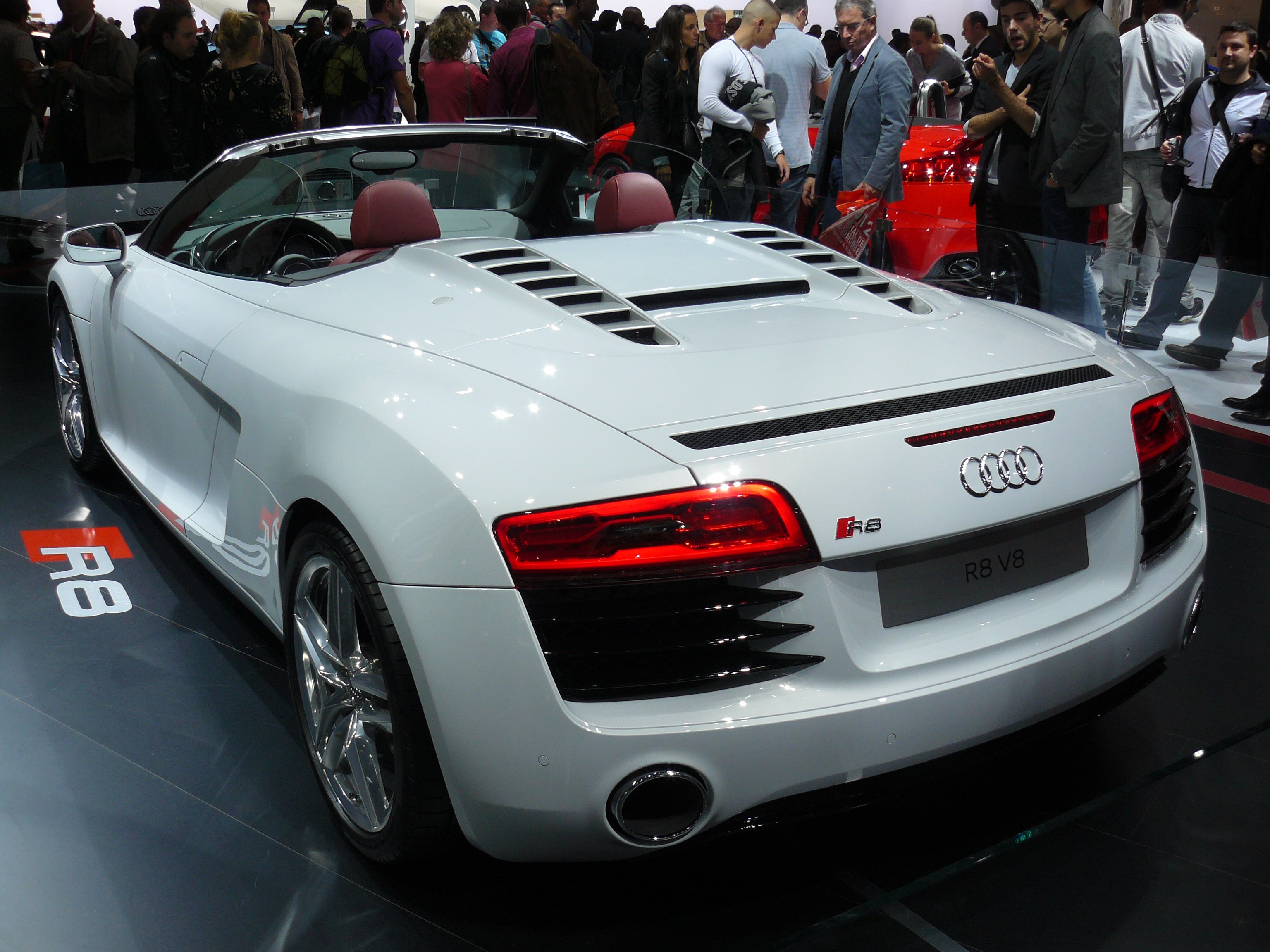 Mondial de Paris 2012